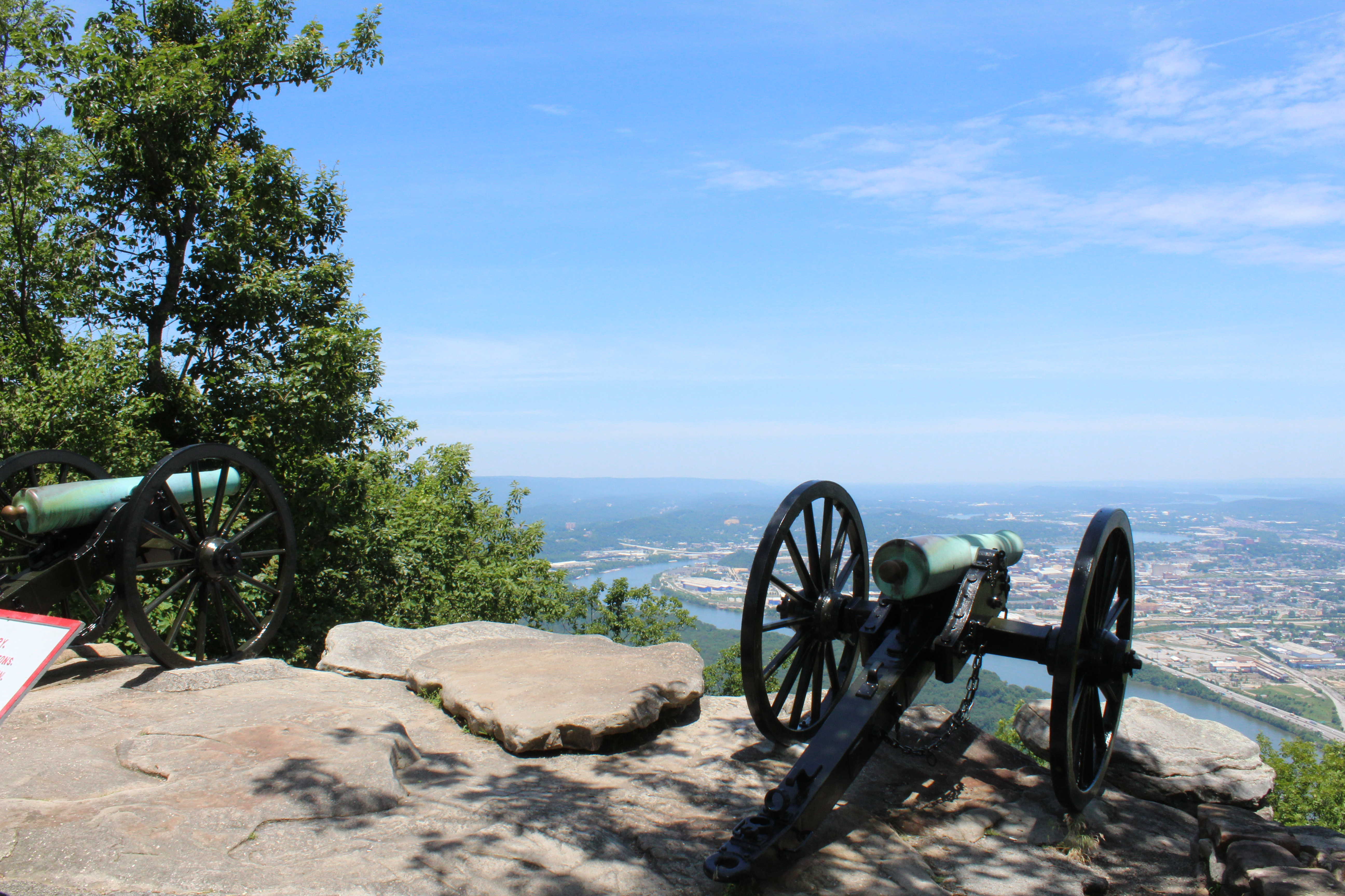 Chickamauga and Chattanooga National Military Park